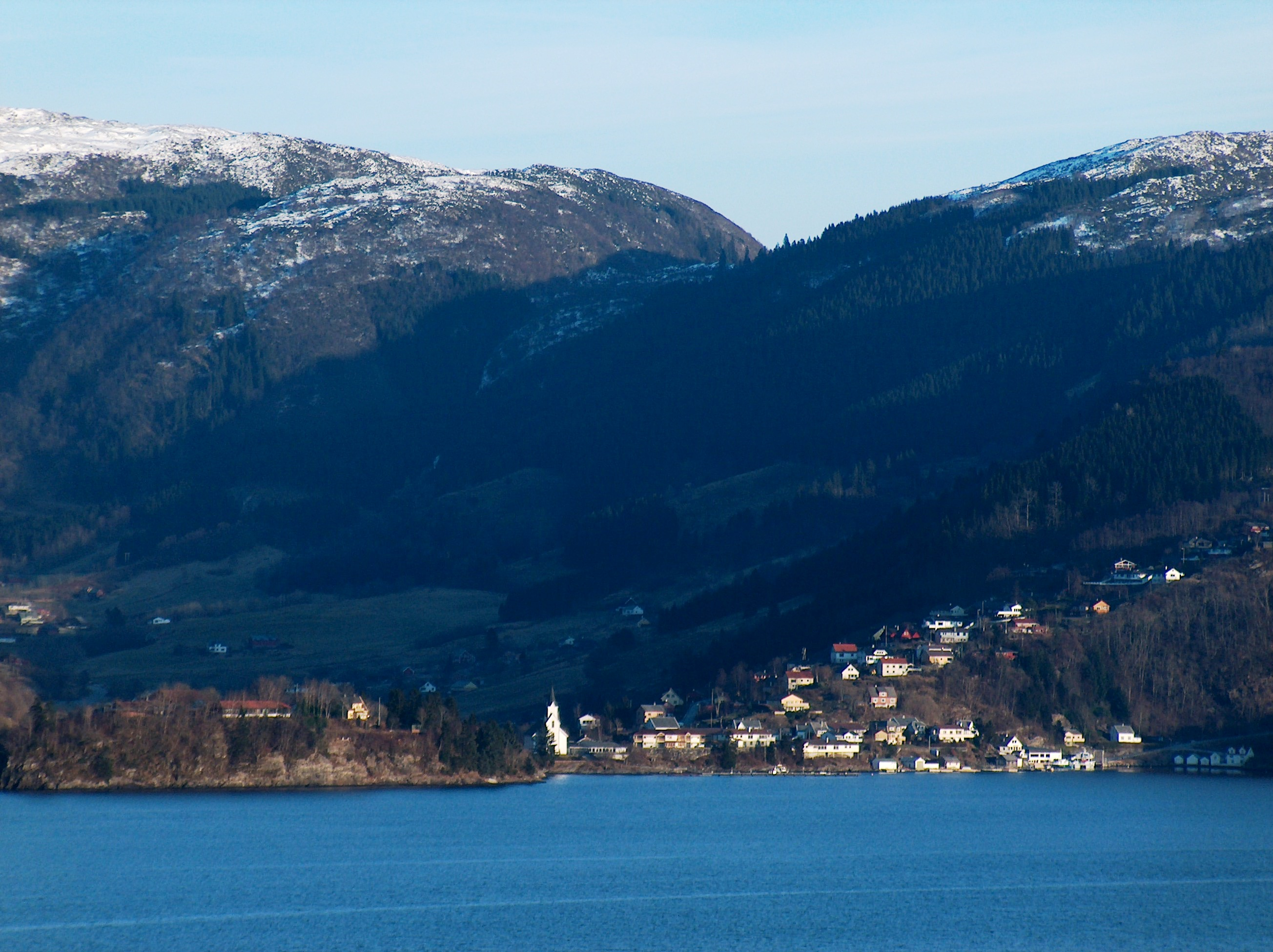 Haus, in Norway